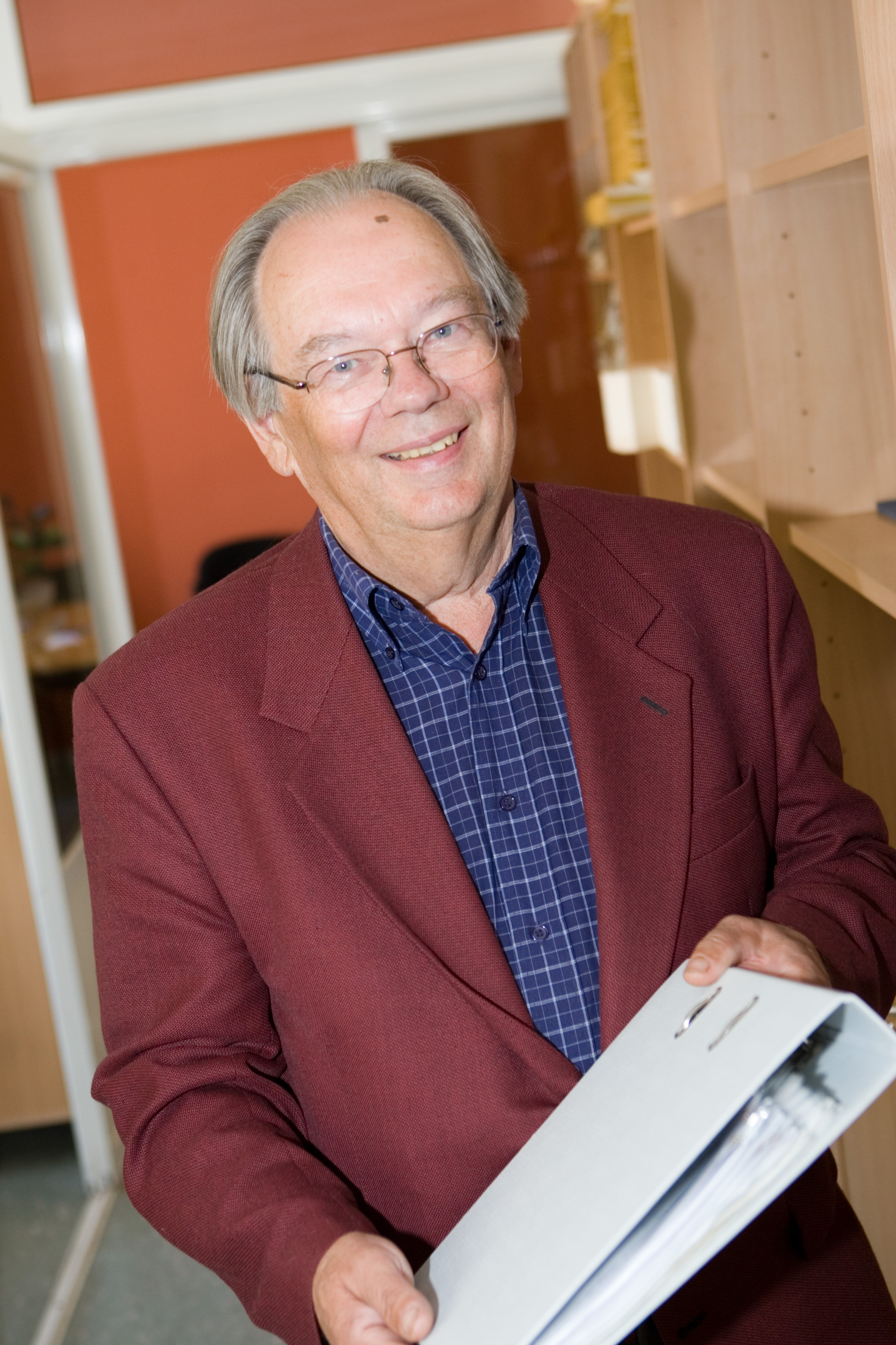 TÜ avatud ülikooli õppekavaarendustalituse projektijuht Väino Puura.